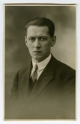 Heinrich Riikoja